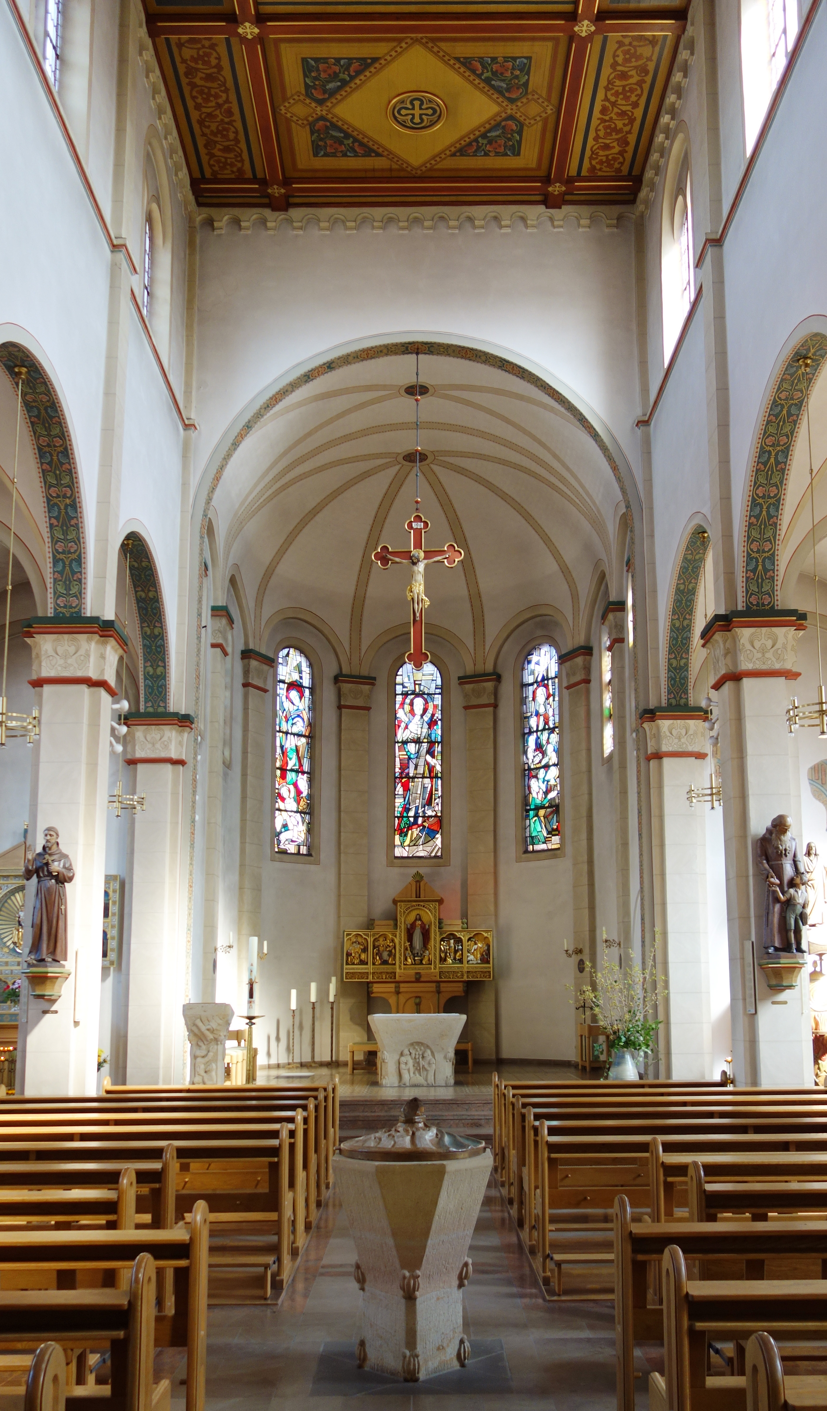 Innenraum der Pfarrkirche St. Vicelin, Neumünster, 2015